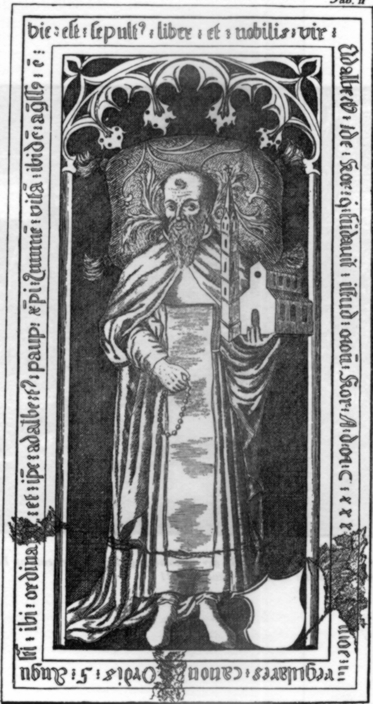 Adlabert von Rohr, Stifter der Klosters Rohr, Niederbayern, Sich der Grabplatte